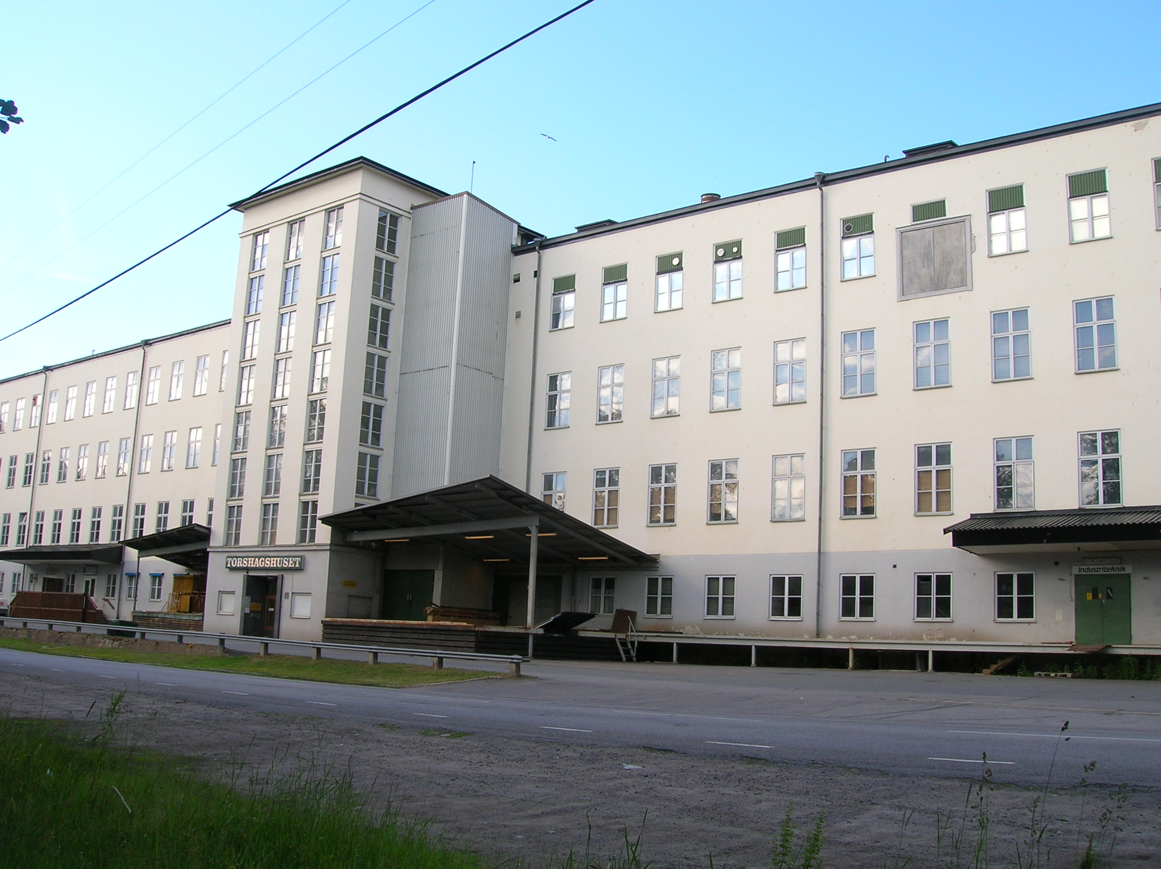 Torshagshuset, former Torshags Bomullsspinneri in Åby, Östergötland, Sweden